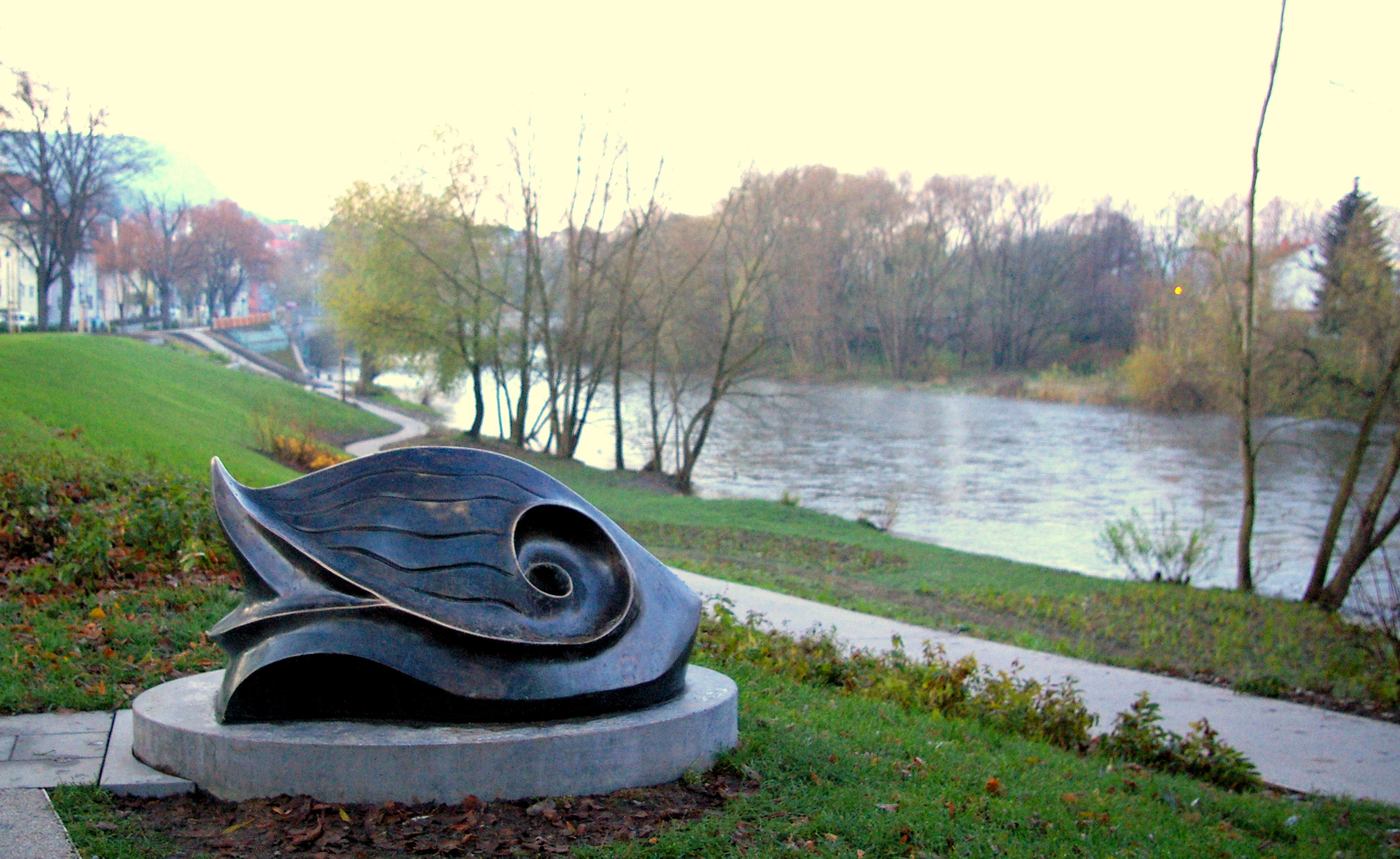 Bronzeplastik "The Big Fish" von Thomas Reichstein am Wenigenjenaer Saaleufer in Jena 2007